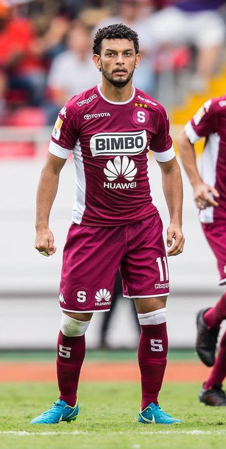 Saprissa 3-1 Alajuelense. Jornada 7, Campeonato de Clausura BP 2018. Estadio Nacional, 28 de enero, 2018. Foto: Jose Campos